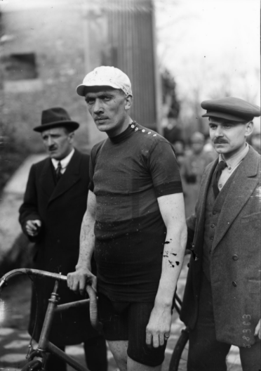 Francis Pélissier au championnat de France de cross cyclo-pédestre le 7 mars 1920.